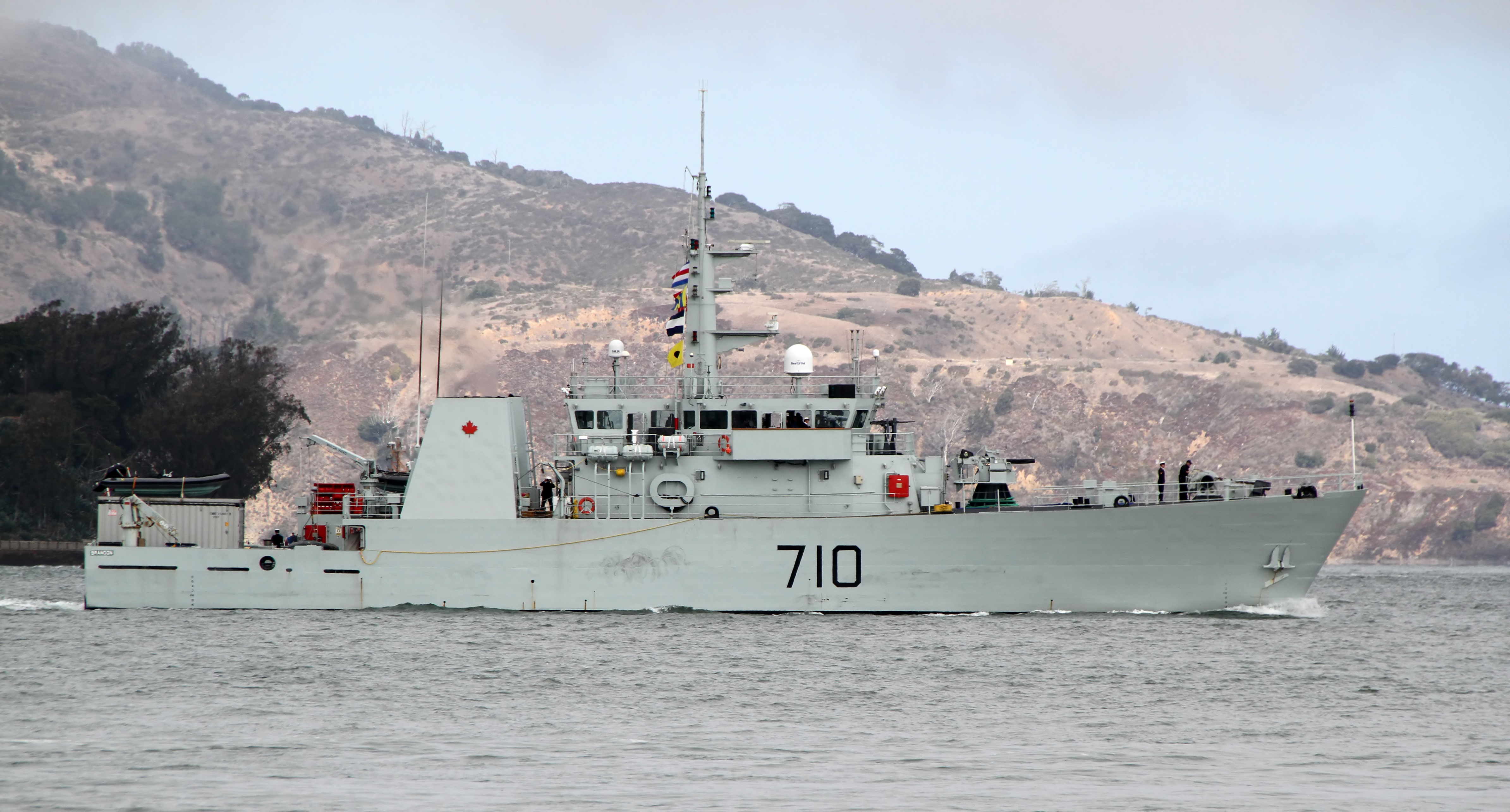 HMCS Brandon